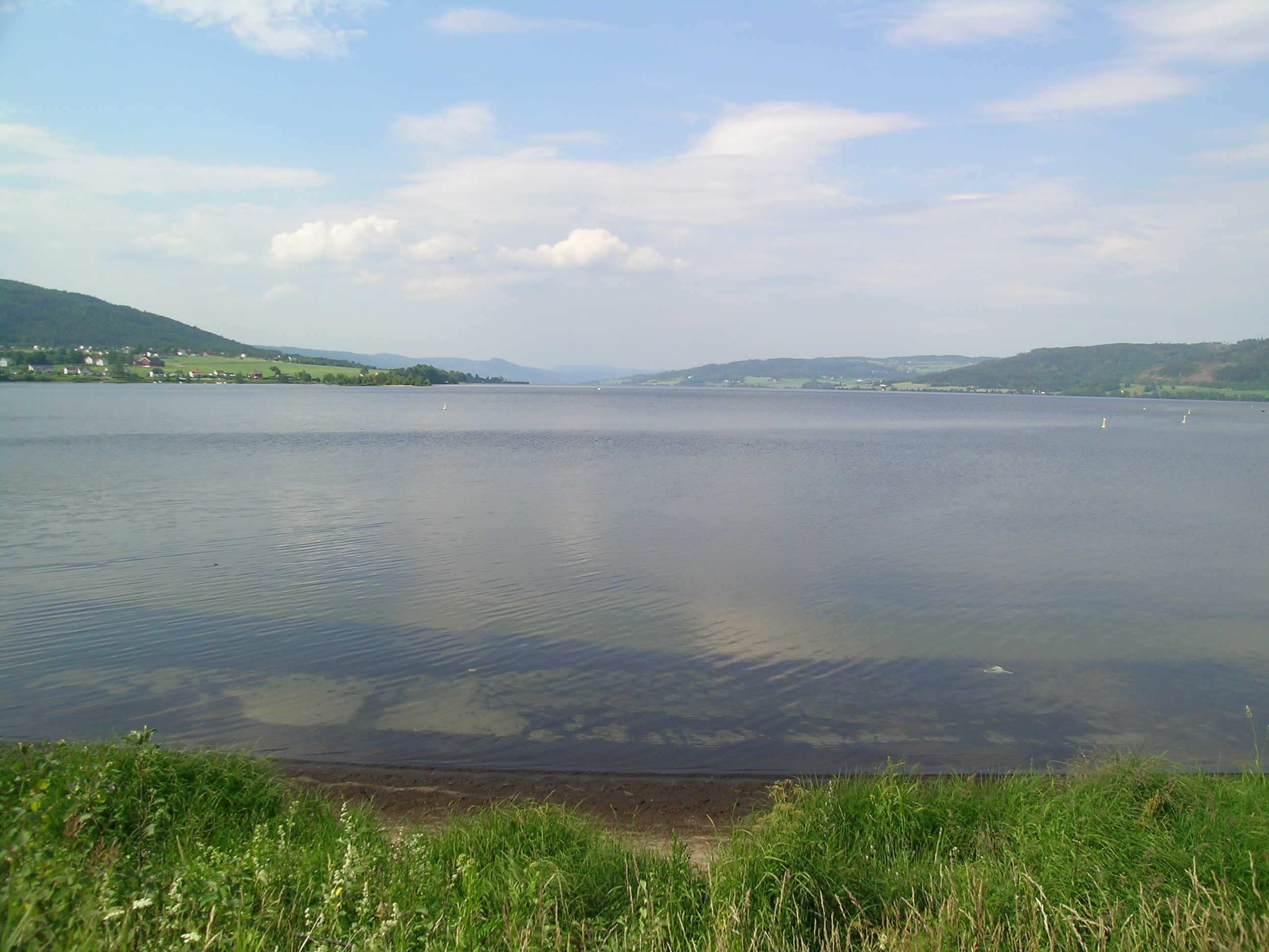 Randsfjorden, seen northwards from Jevnaker.